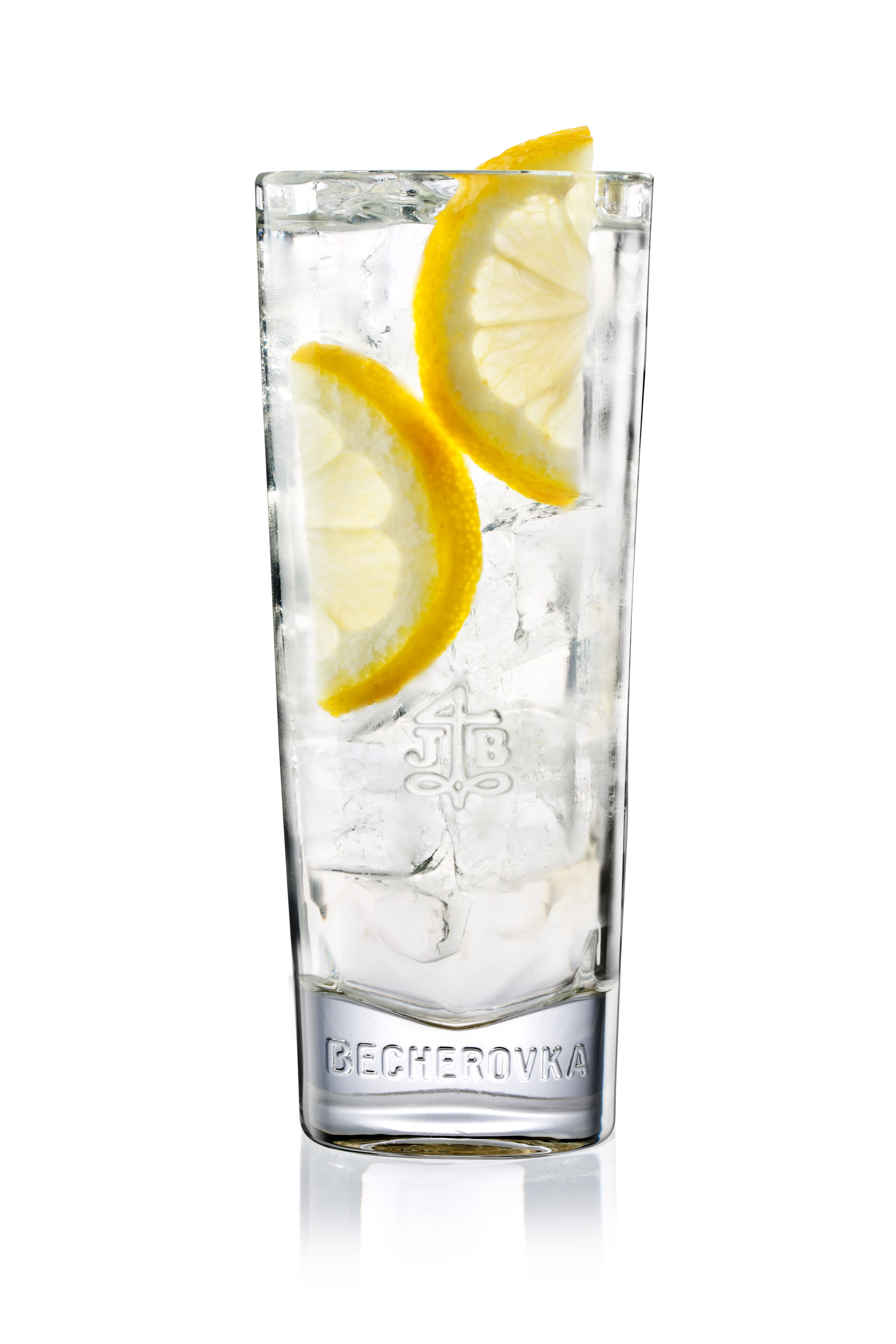 Beton